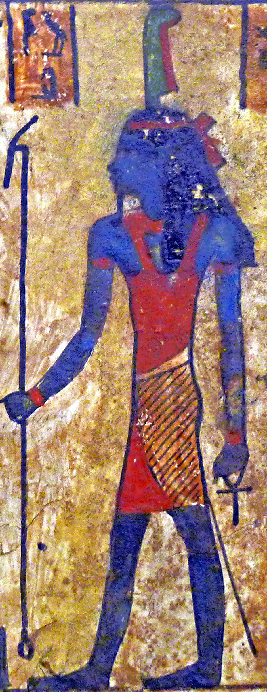 détail de l'image centrale gauche ; Shou.